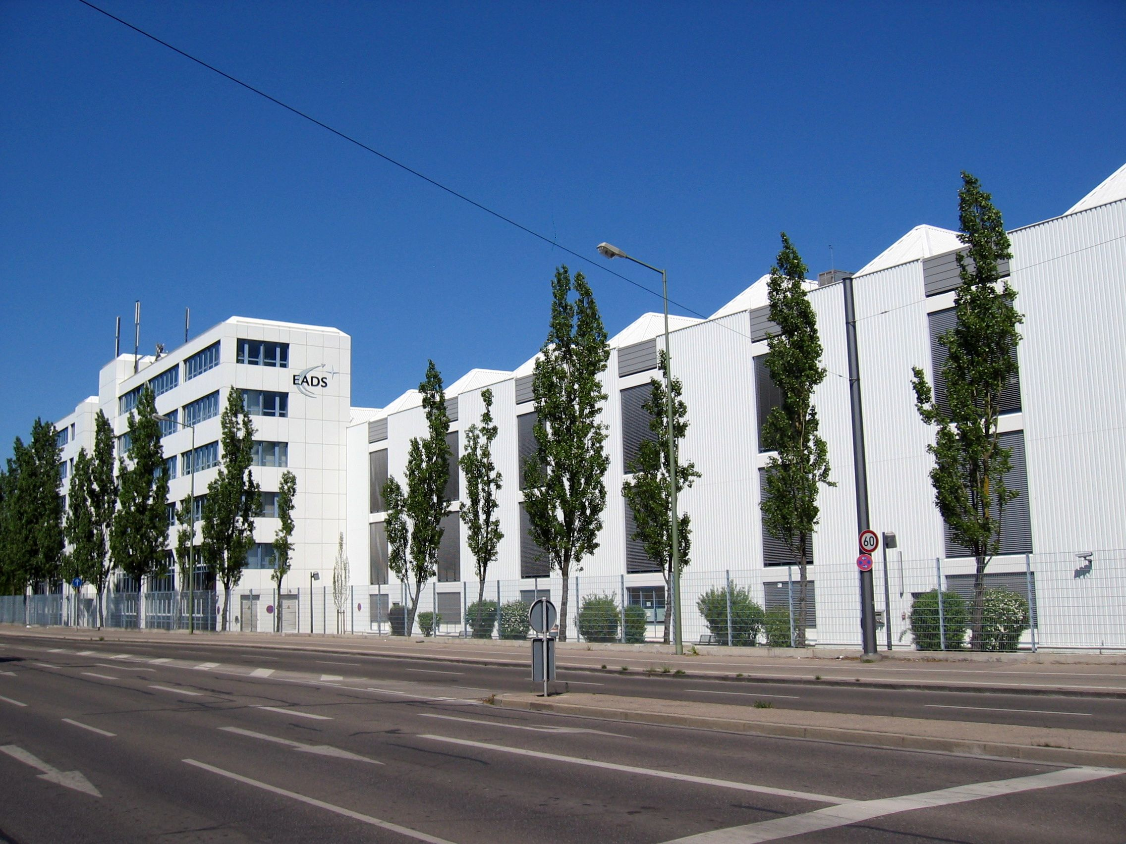 Zusehen ist das EADS-Werk in Haunstetetn in Haunstetten